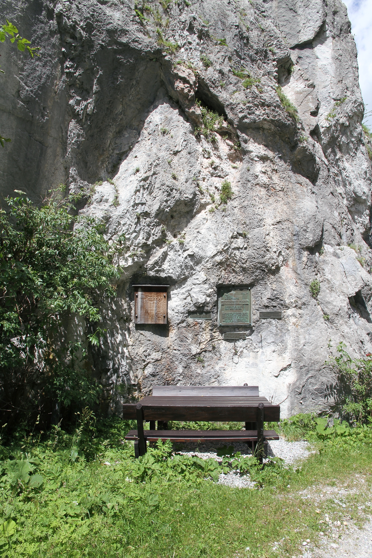 Rastplatz im Reißtal in Naßwald, eine Rotte der niederösterreichischen Marktgemeinde Schwarzau im Gebirge. Links an der Felswand ist eine Gedenktafel für Daniel Innthaler und rechts für Konrad Kain (Conrad Kain) angebracht.